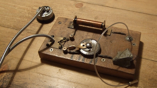 Crystal_Radio_Set